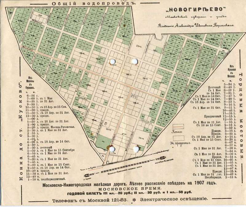 План посёлка Новогиреево Московской губернии и уезда. 1907 год. Из брошюры «Описание единственного в России благоустроенного посёлка „Новогиреево“»